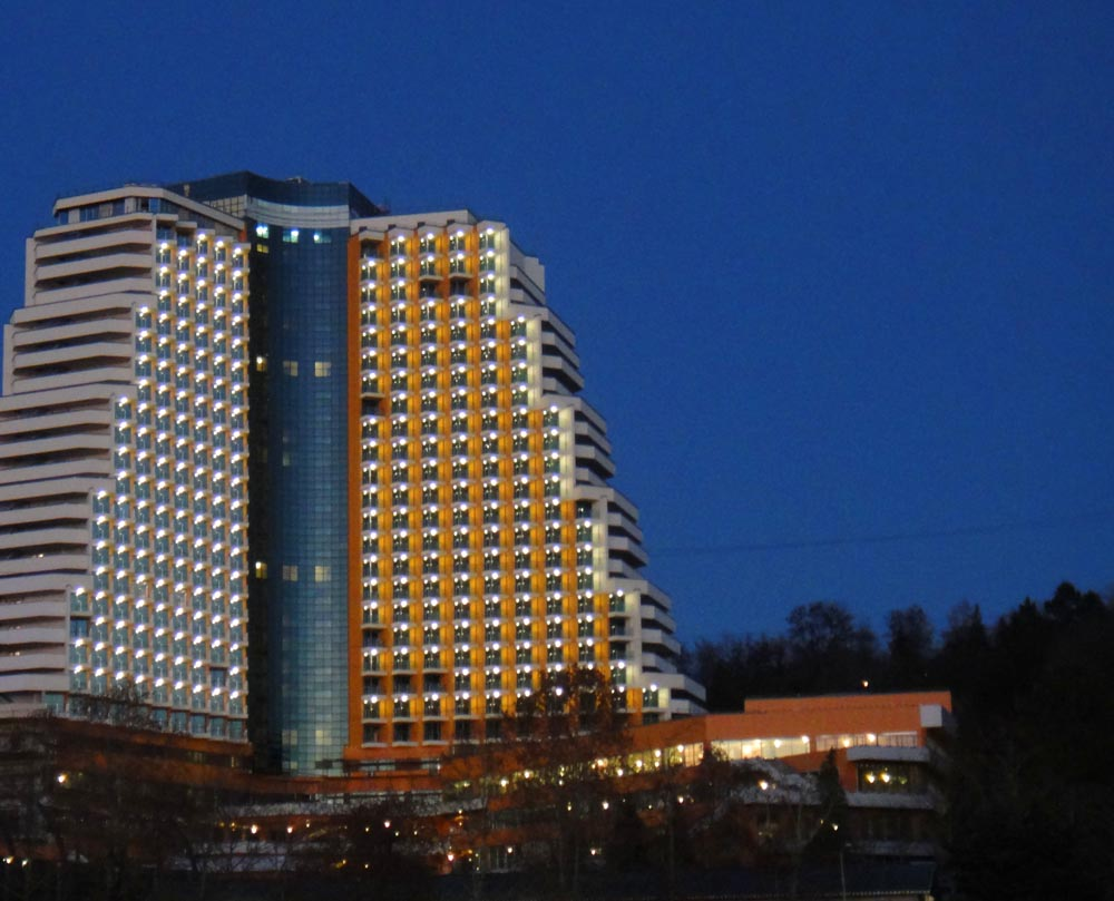 ОК "Дагомыс" во время реконструкции (январь 2013)